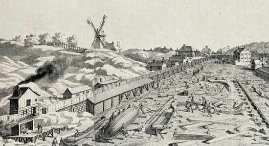 Stora varvet med Åsöberget och Bagarkvarnen till vänster.